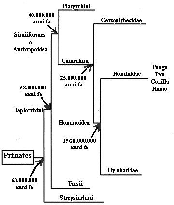 Albero filogenetico dei primati